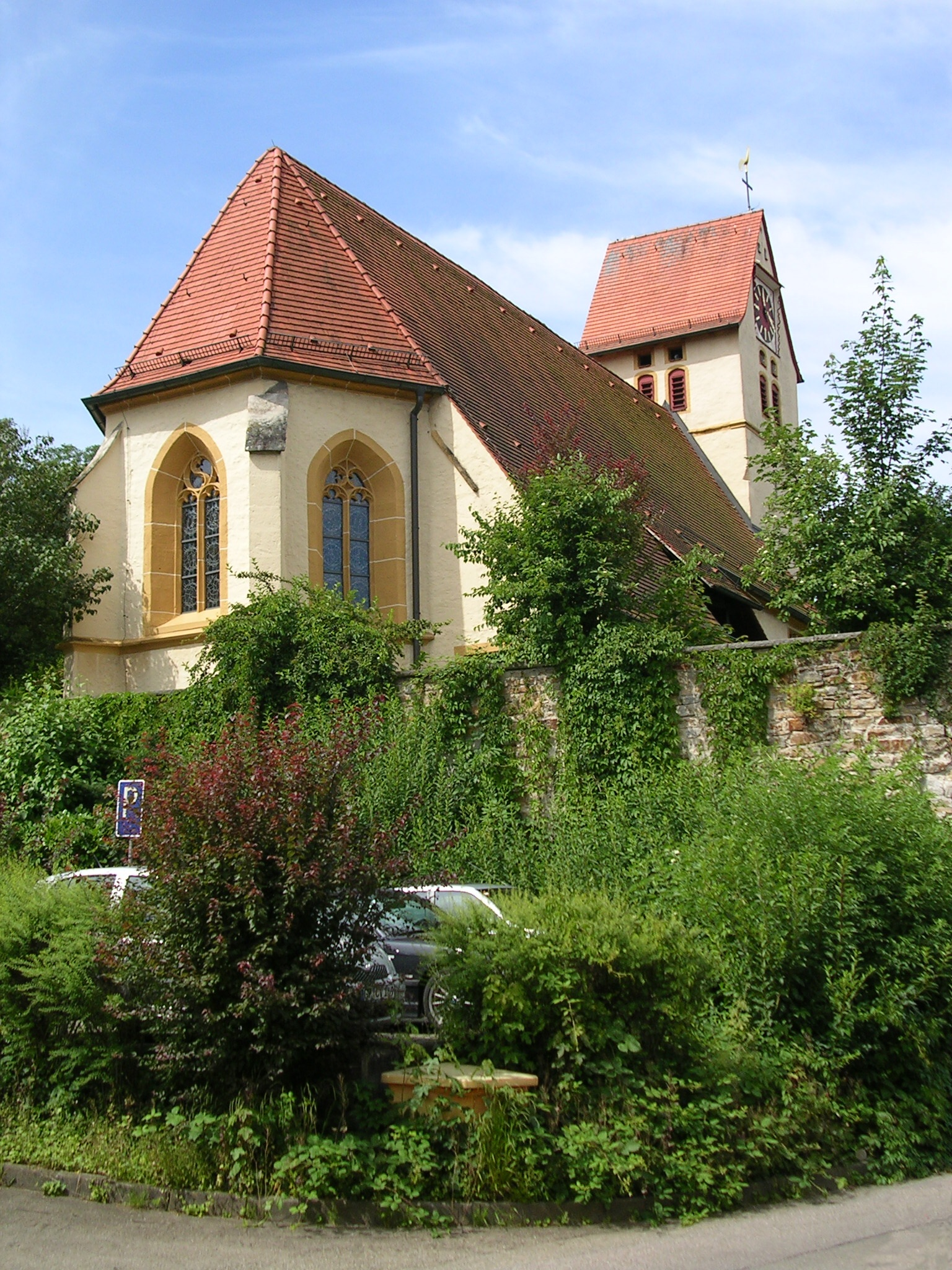 Evangelische Kirche in Deizisau (Protestant church, Deizisau, Germany)